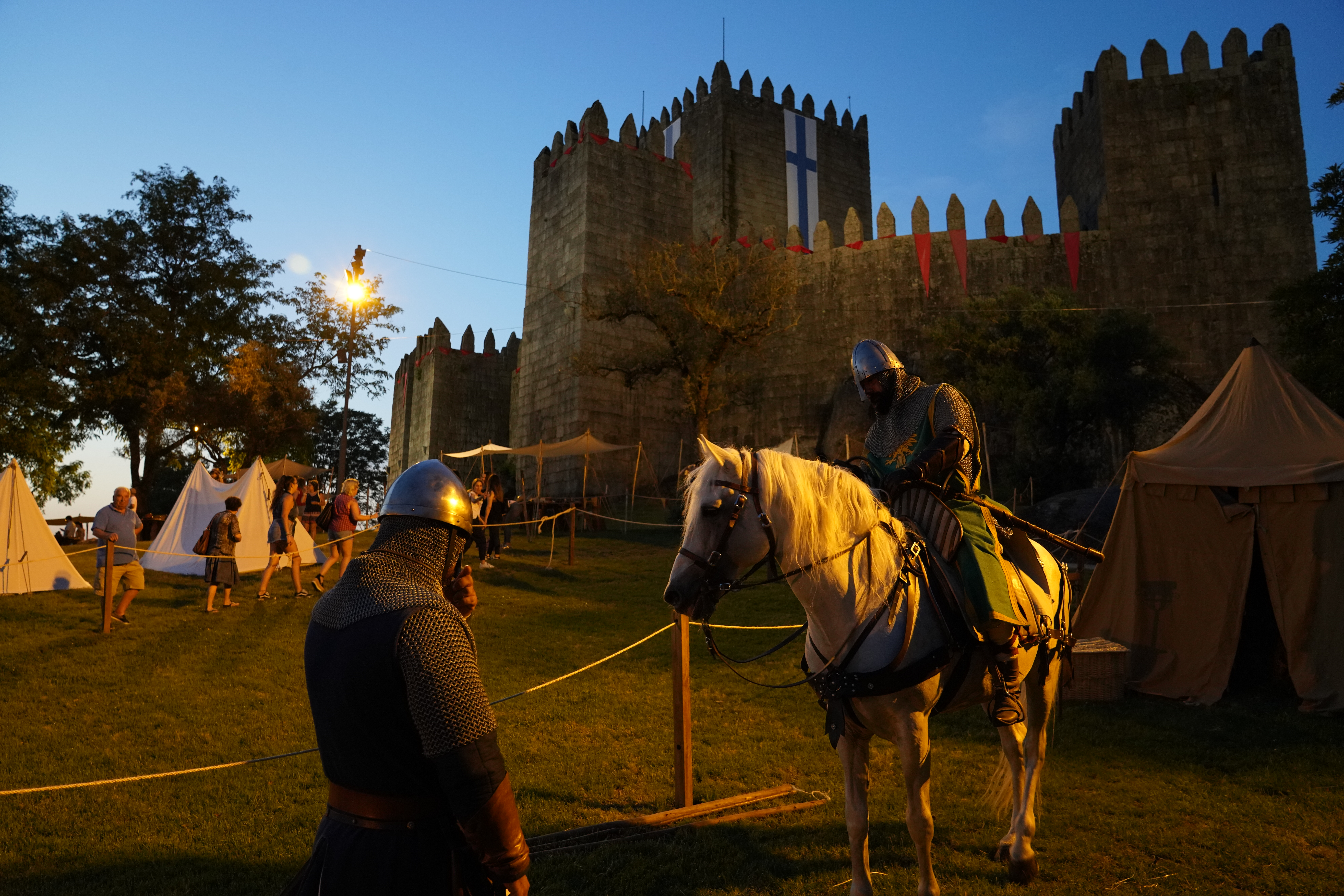 A Feira Afonsina é um evento de recreação histórica que tem como enquadramento temporal o período da pré-fundação da nacionalidade portuguesa.